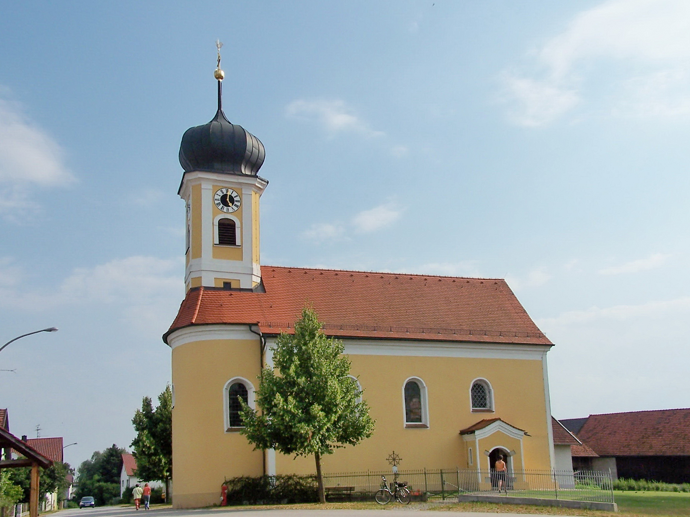 Barbing, Eltheim Kapellenstraße 9. Katholische Filialkirche St. Laurentius, Saalbau mit eingezogenem Chor und Chordachreiter mit Zwiebelhaube und Pilastergliederung, 1725; mit Ausstattung.